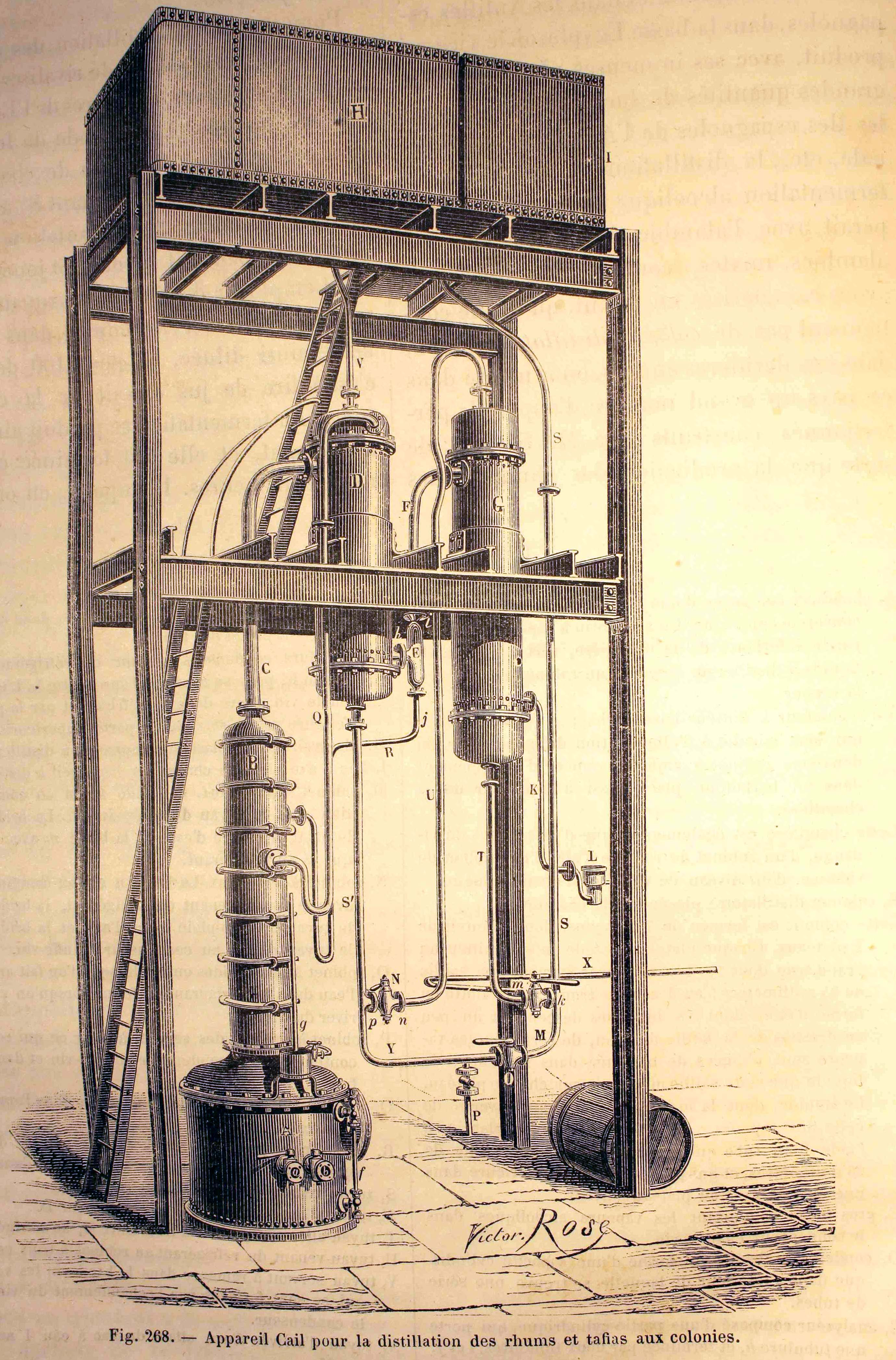 . Ilustraciones de la obra : Les merveilles de l'industrie ou, Description des principales industries modernes / par Louis Figuier. - Paris : Furne, Jouvet, [1873-1877]